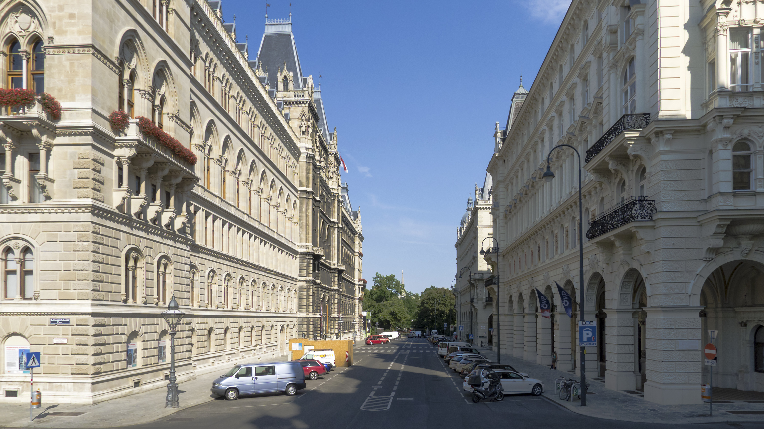 Lichtenfelsgasse in Wien 1 beim Friedrich-Schmidt-Platz Richtung Osten